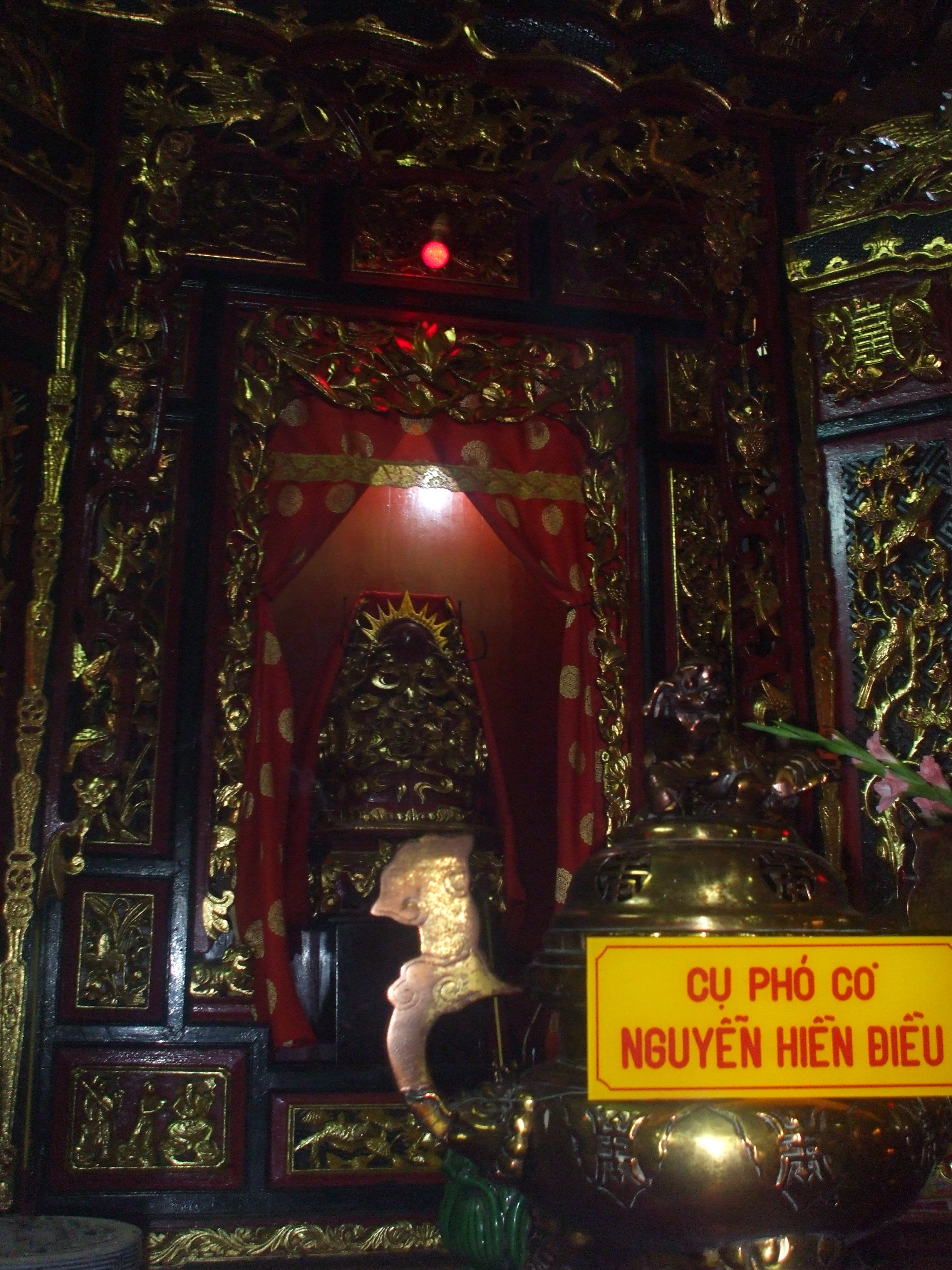 Khám thờ Nguyễn Hiền Điều, trong đền thờ Nguyễn Trung Trực, TP. Rạch Giá, Kiên Giang, Việt Nam.